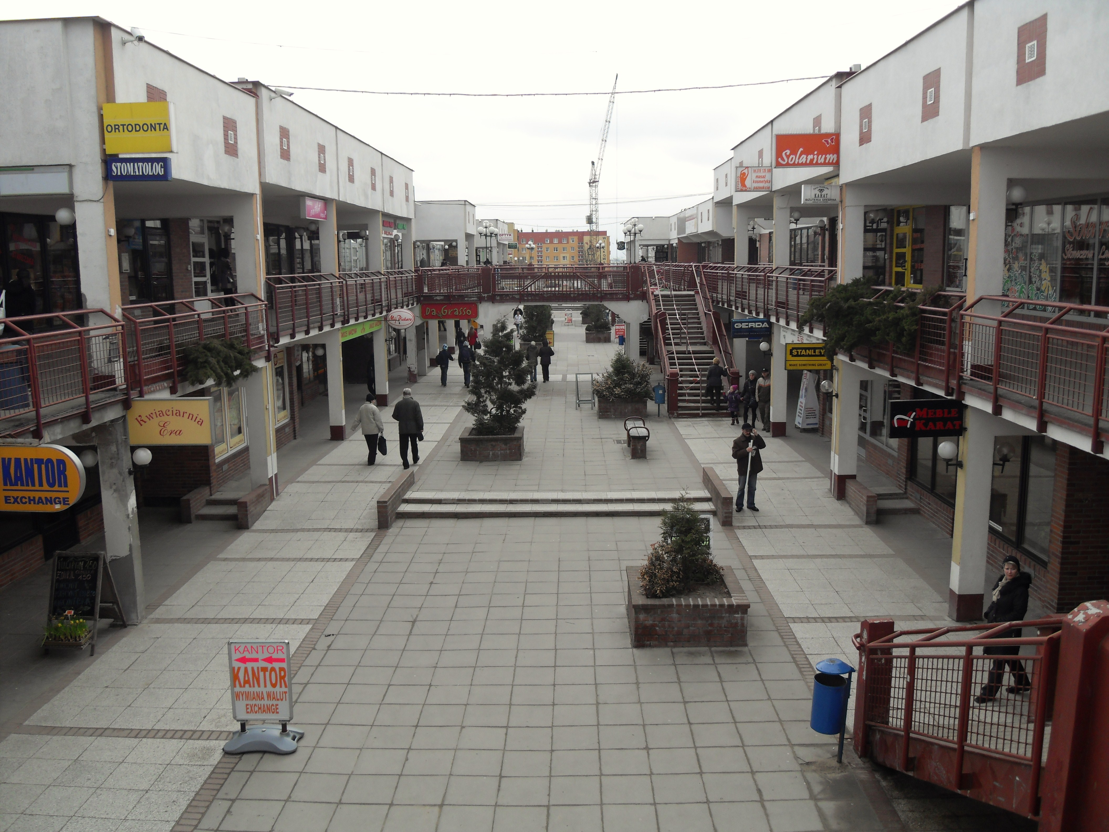 Pasaż Chełmski w Gdańsku Chełmie, ul. Cieszyńskiego.